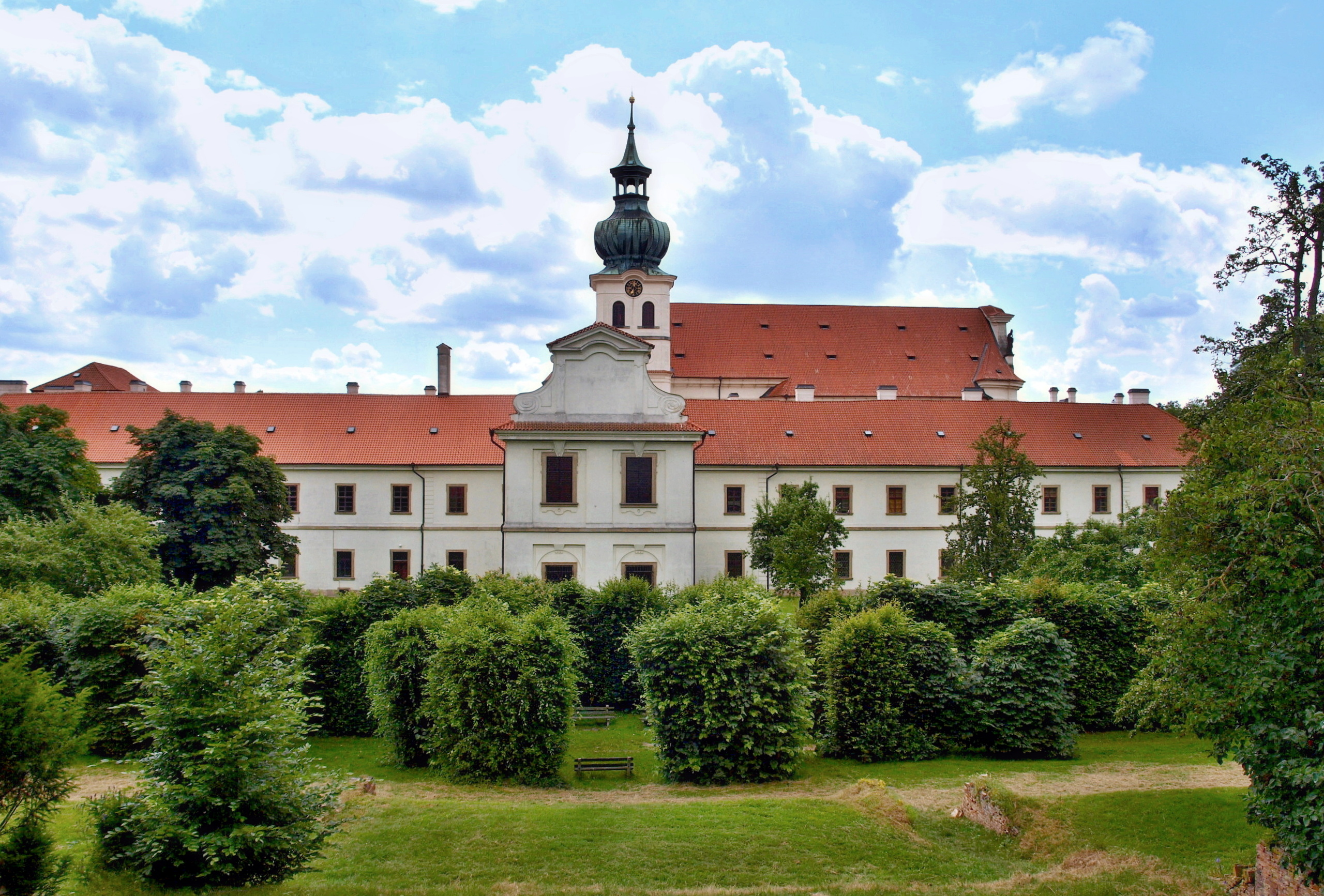 Břevnov klášter